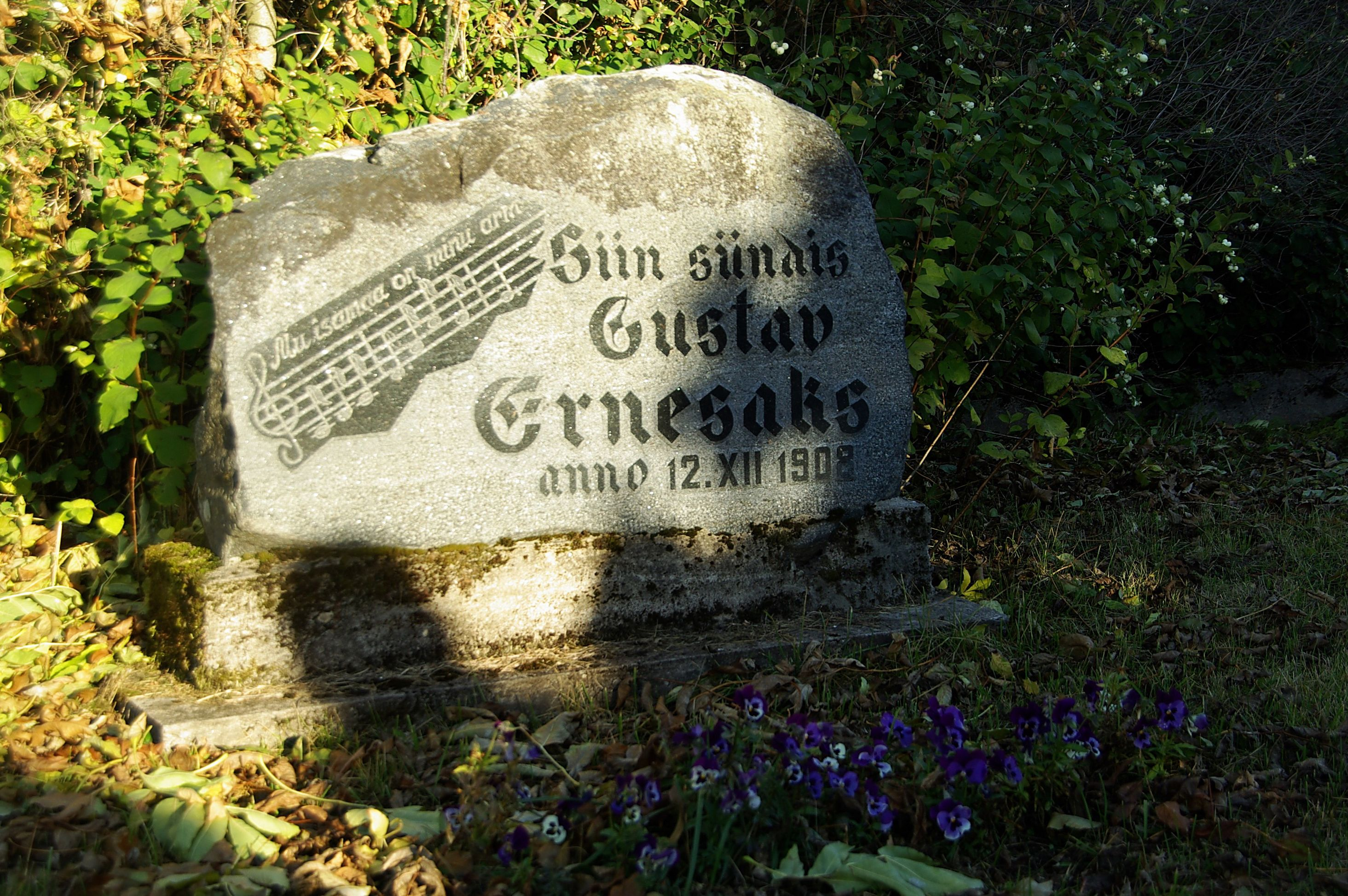 Harjumaa,Peningi vald